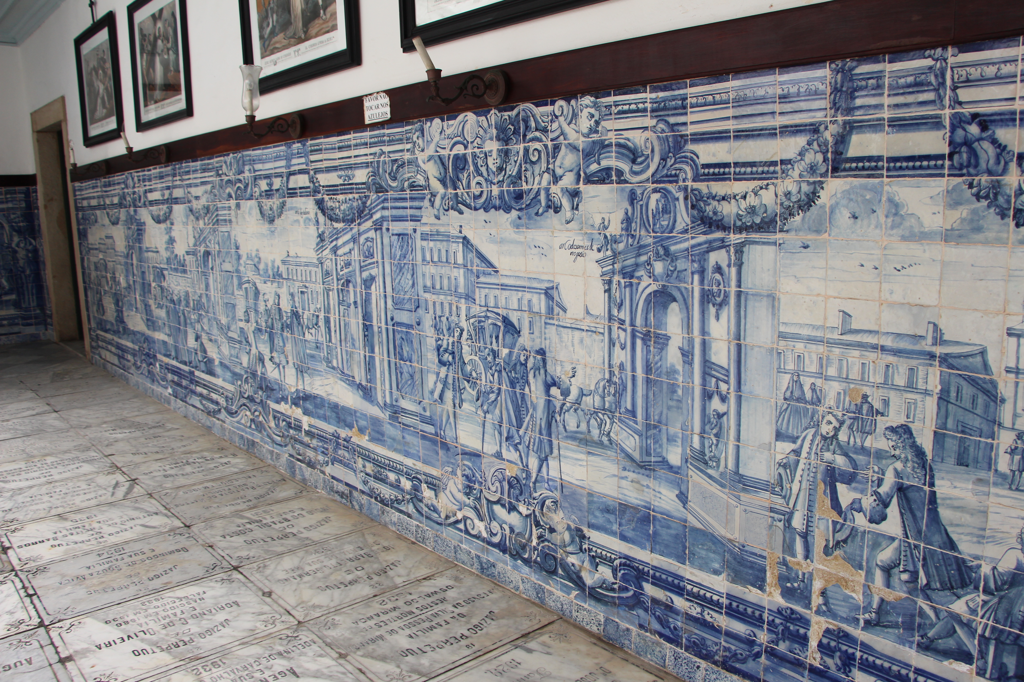 Igreja da Ordem Terceira de São Francisco (Salvador)